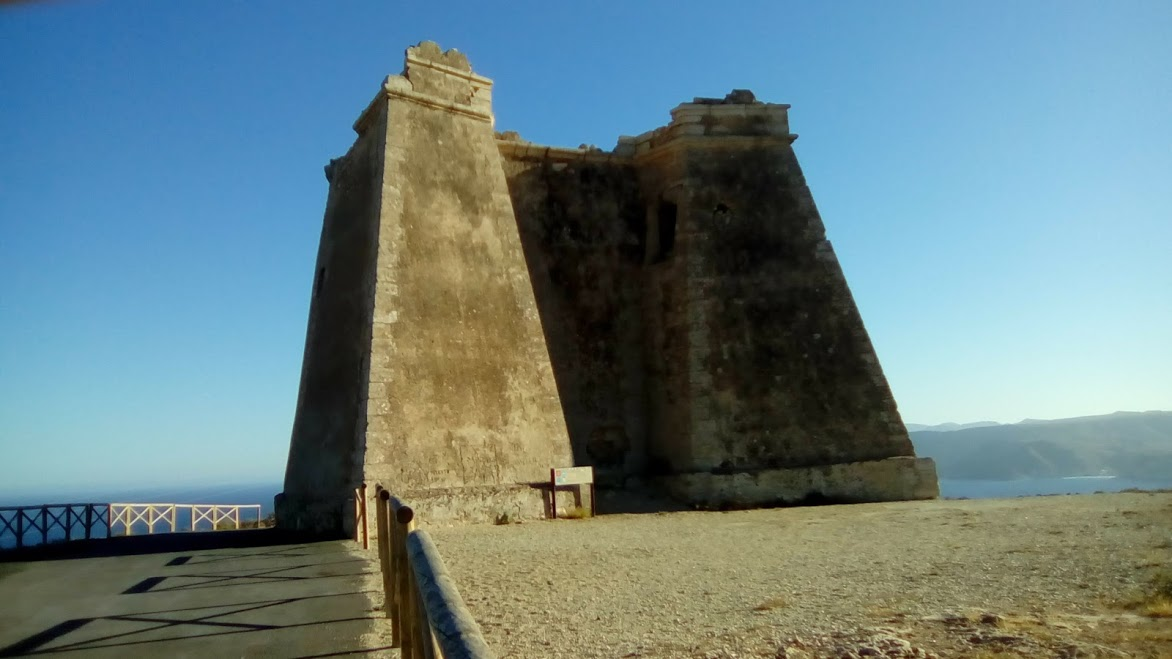 Fotografía de la Torre de La Mesa Roldán, torre de vigilancia costera tipo pezuña, en el municipio de Carboneras, provincia de Almería, Andalucía, España.